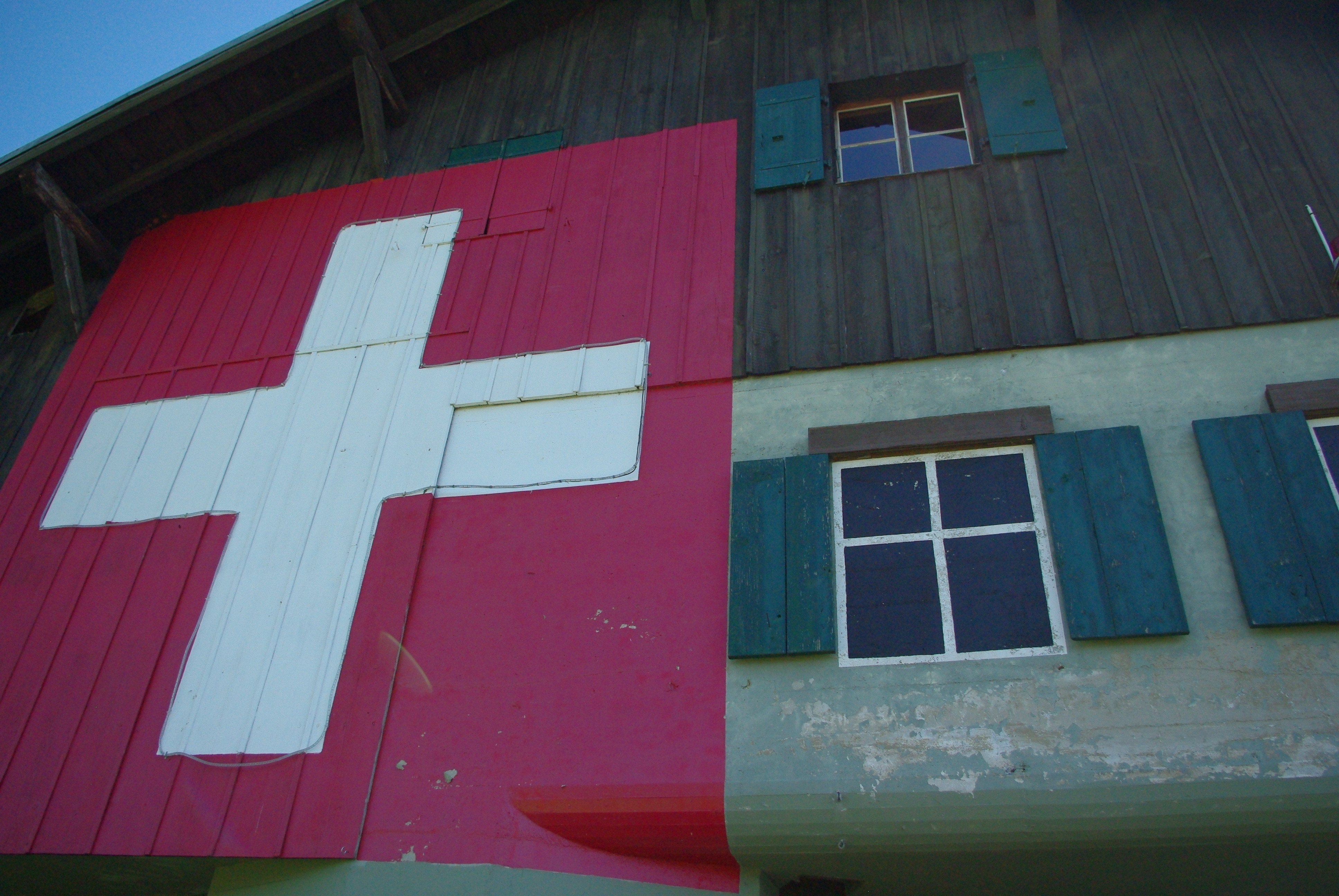 Façade du fort de Pré-Giroud lors de la sortie photo du 18-08-2012